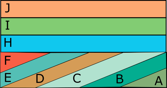 Una serie de estratos más antiguos que se plegó, después hubo una interrupción de sedimentos durante millones de años y al final se superpuso unos estratos más modernos.